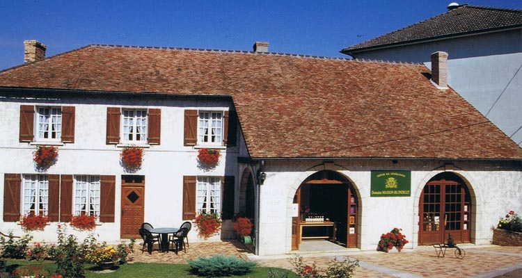 Pouilly Fumé - Domaine Masson-Blondelet